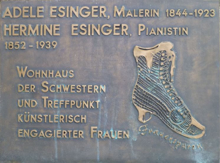 Adele_und_Hermine_Esinger_-_Gedenktafel